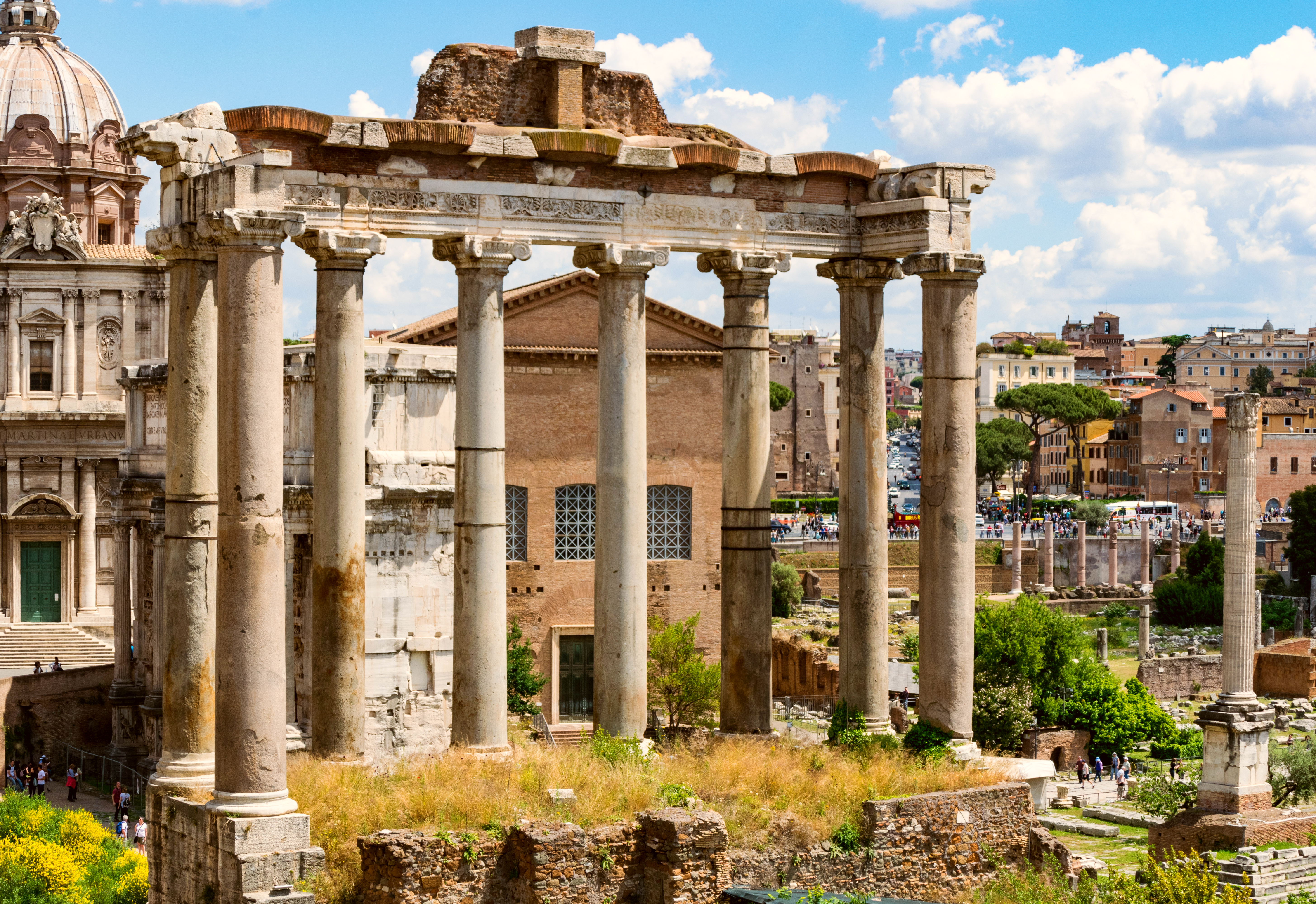 Die Rückseite von der Vorhalle des Saturntempels